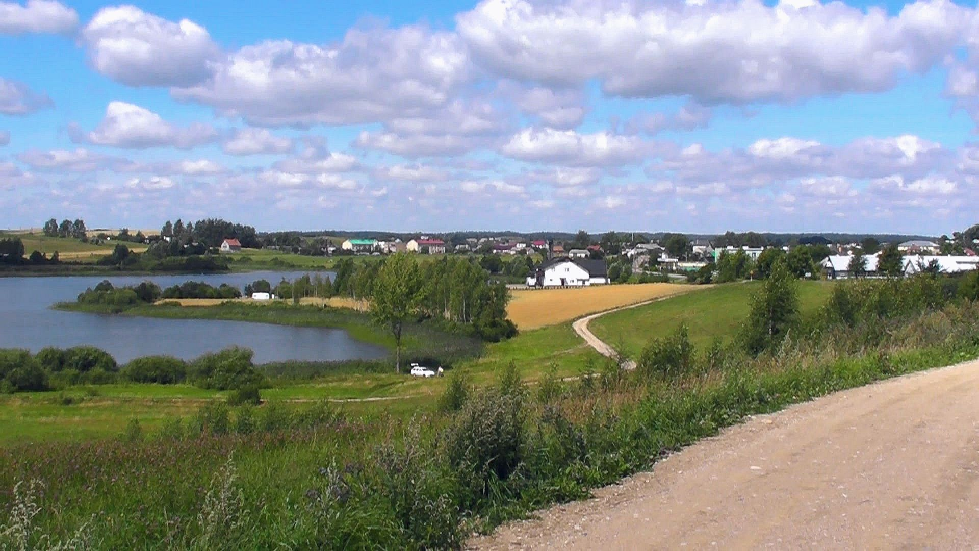 WIDOK NA WIŻAJNY.